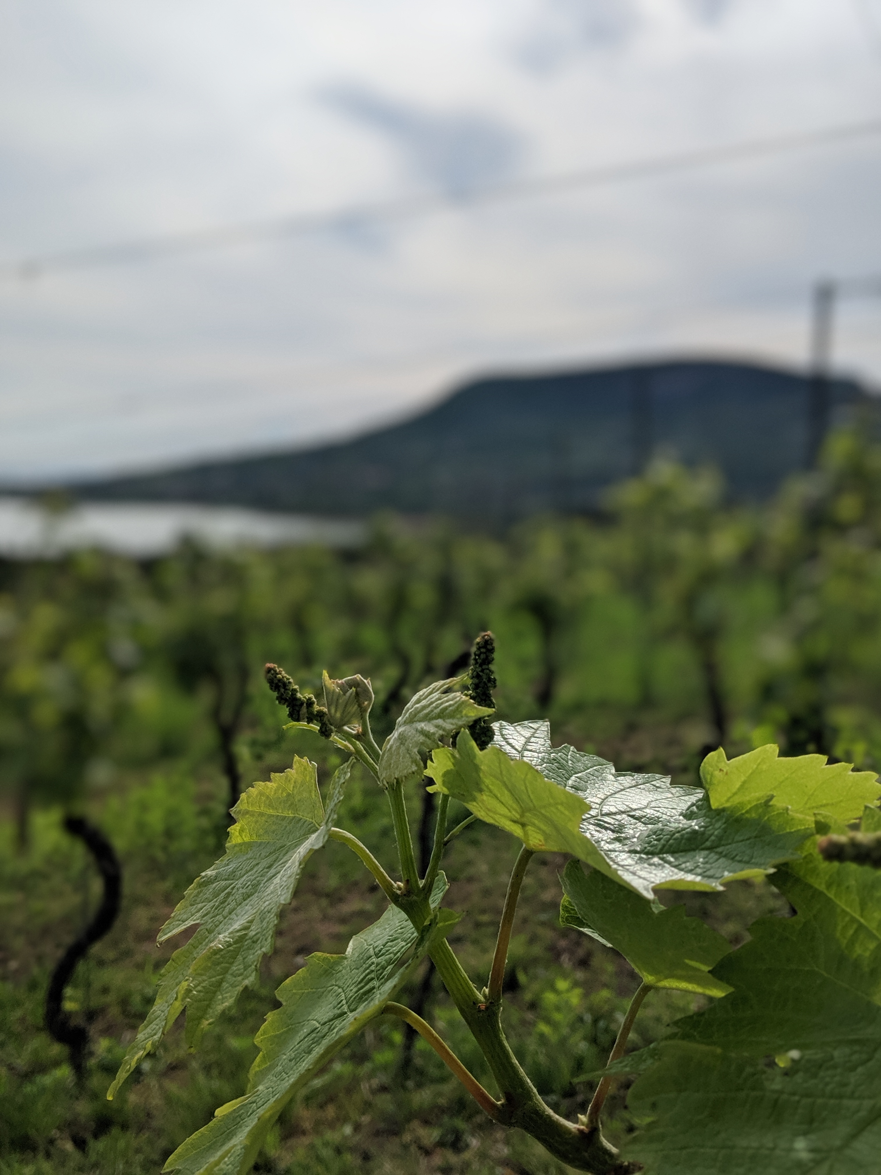 Badacsonyörs szőlővirágzás